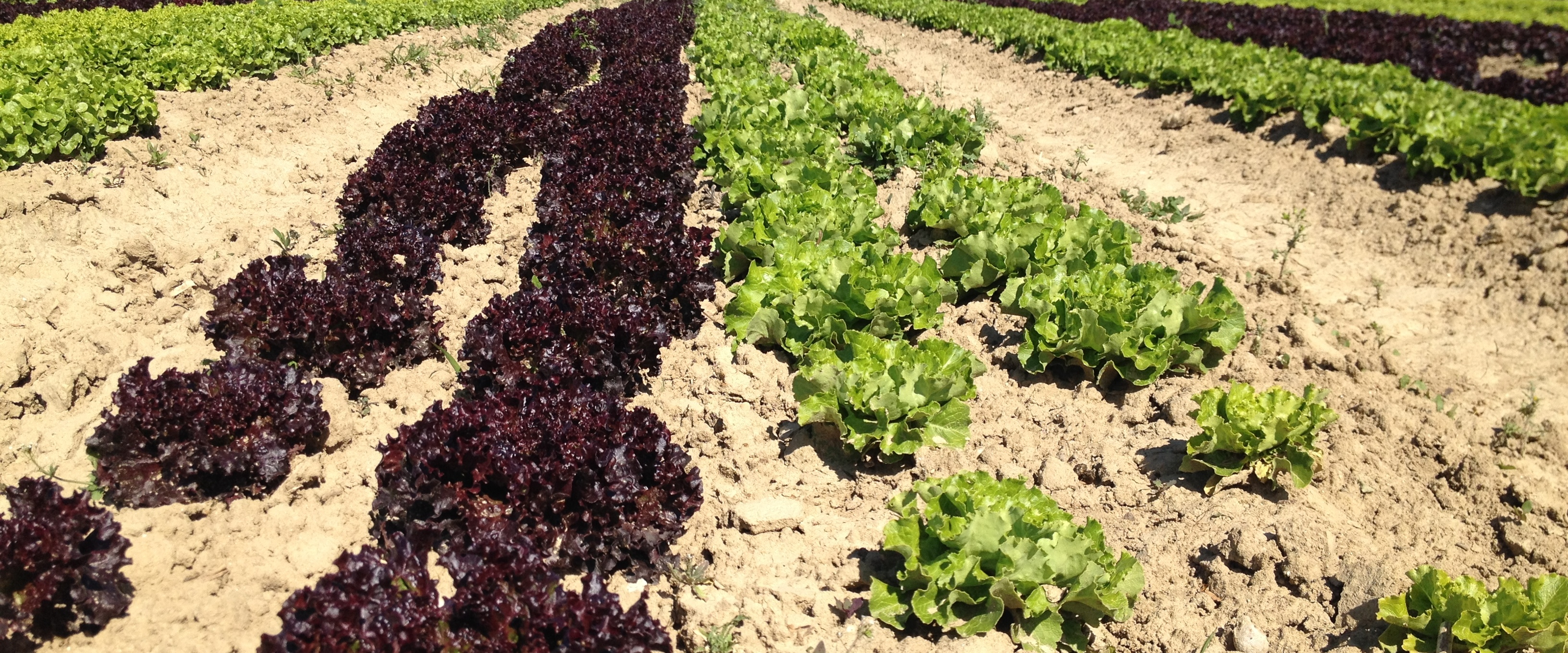 Salades - Fraisochamps - Thil.